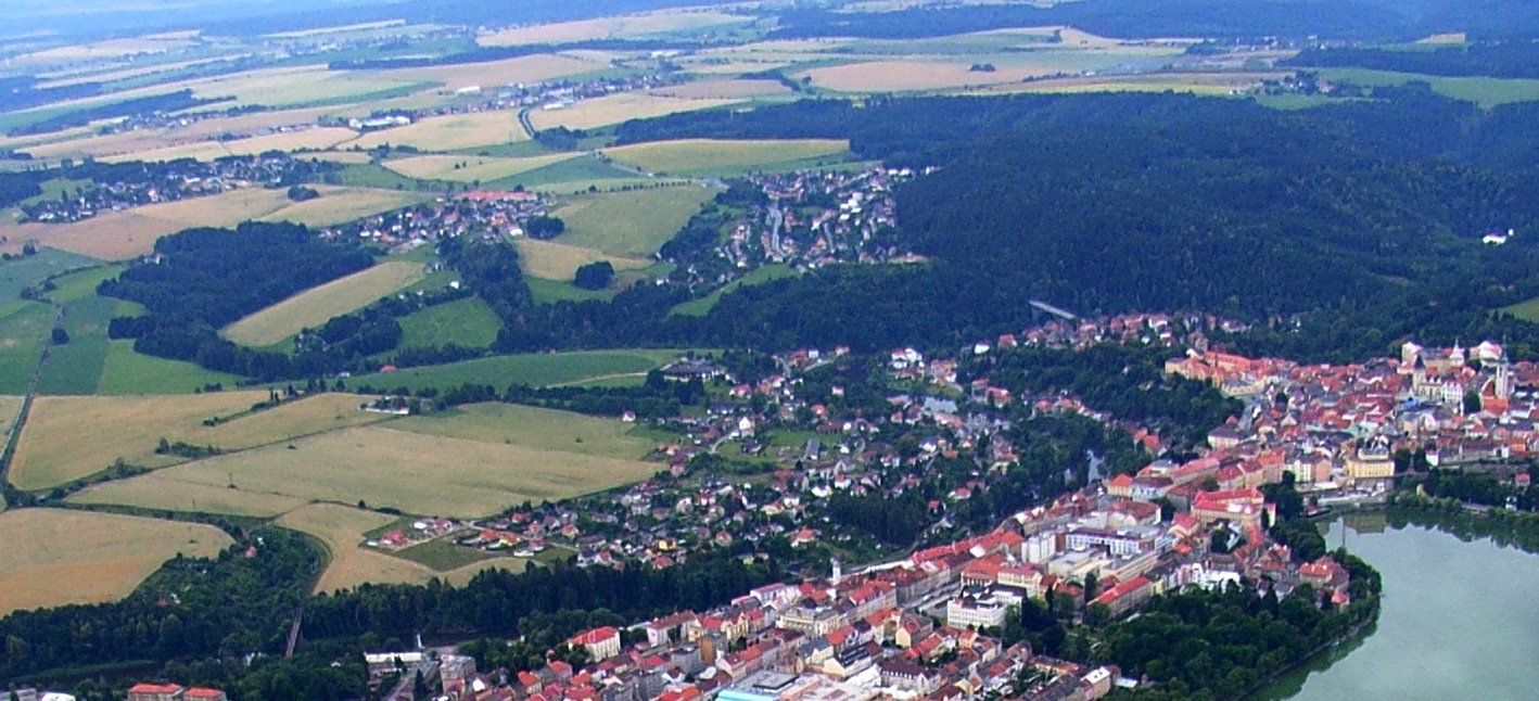 Česky: Letecký pohled na Čelkovice. Vlevo nahoře Větrovy, vpravo Staré Horky a (u lesa) Horky, dole Čelkovice a Tábor.